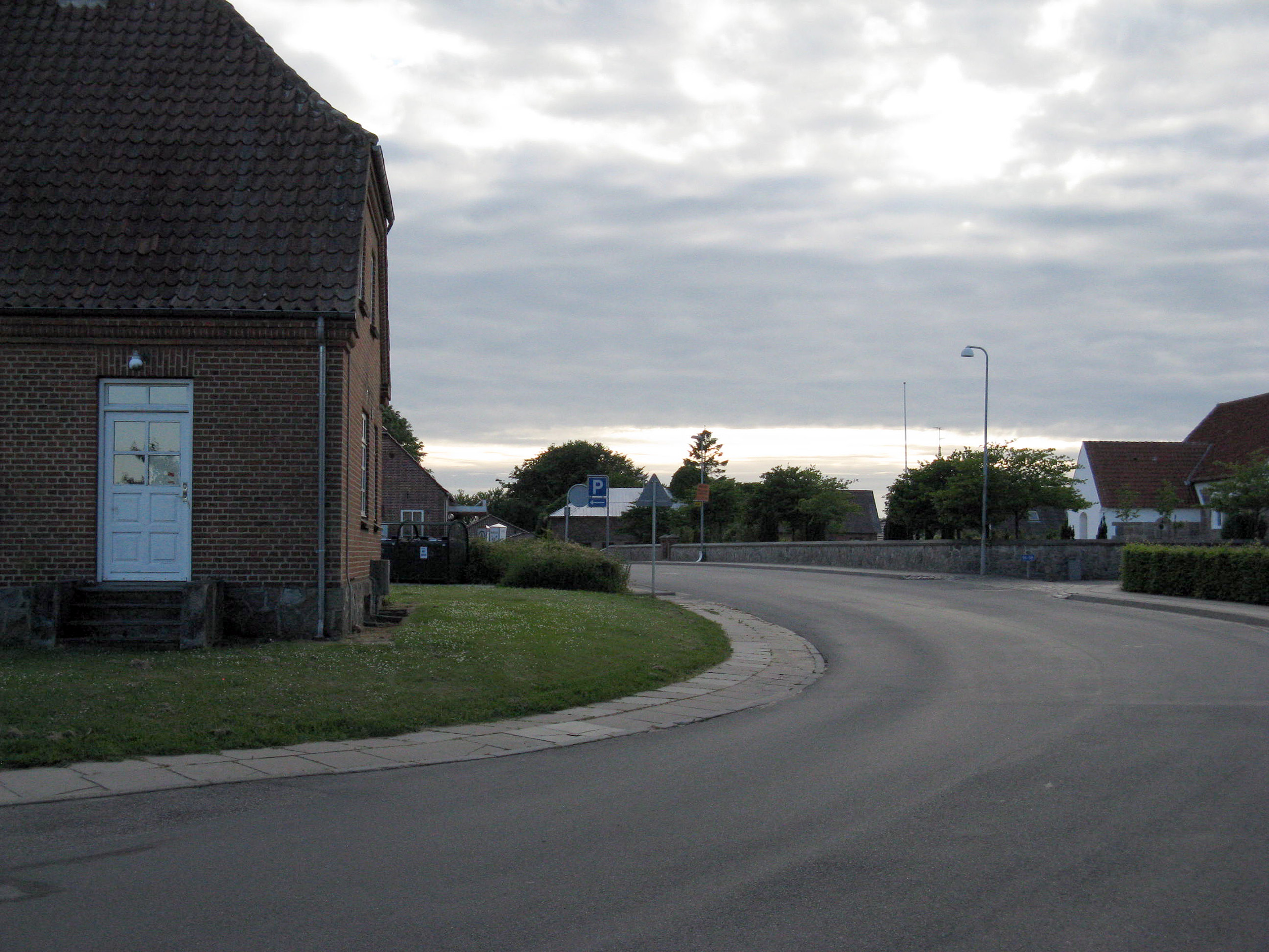 Funder Kirkeby, Silkeborg Kommune